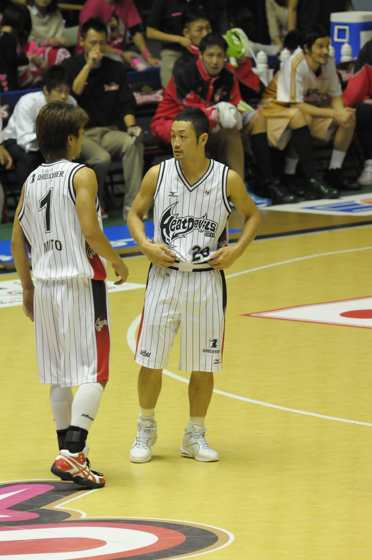 大分ヒートデビルズ、小原匡博選手。秋田県立体育館で。